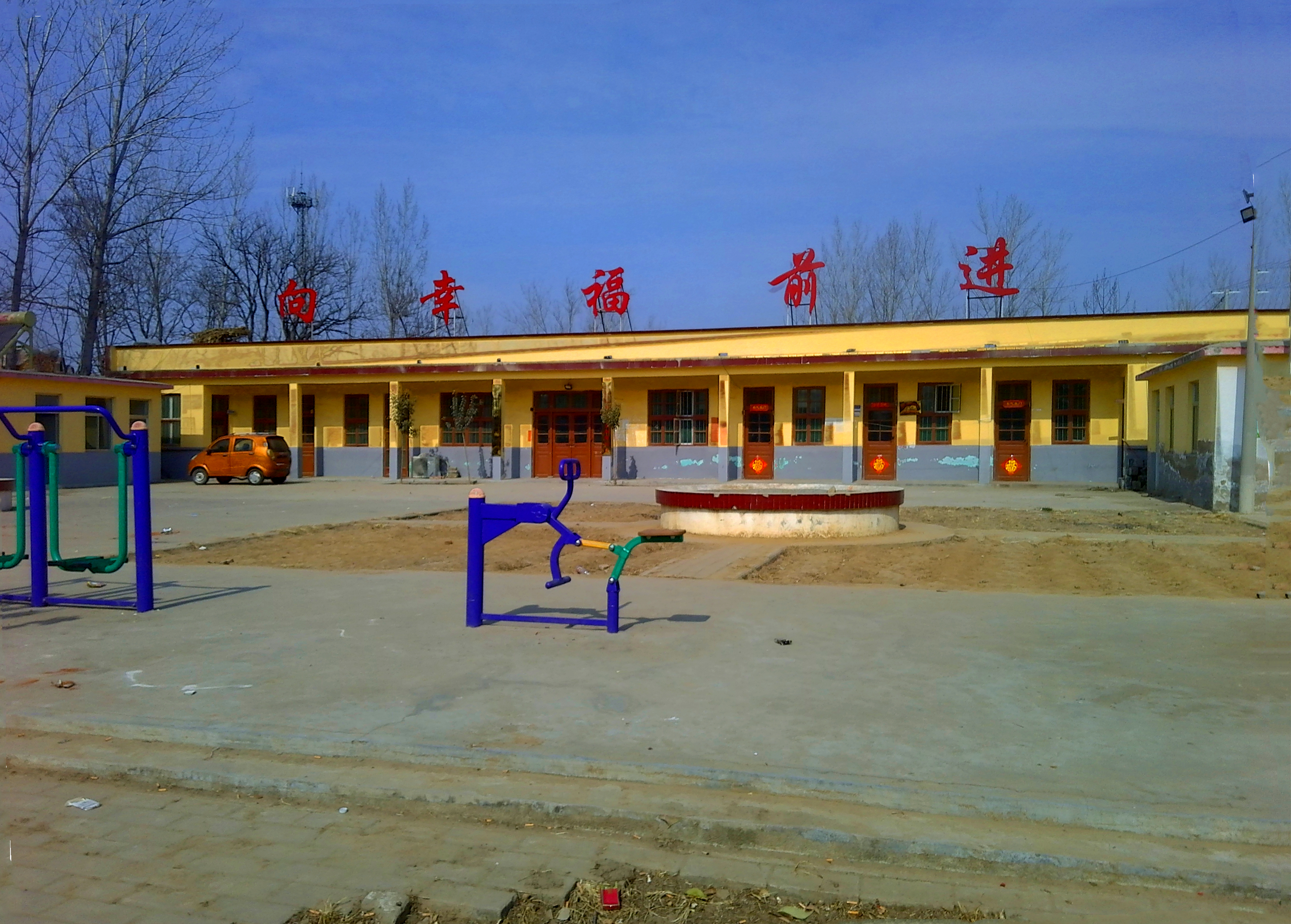 中文（中国大陆）: 东梁村村委会